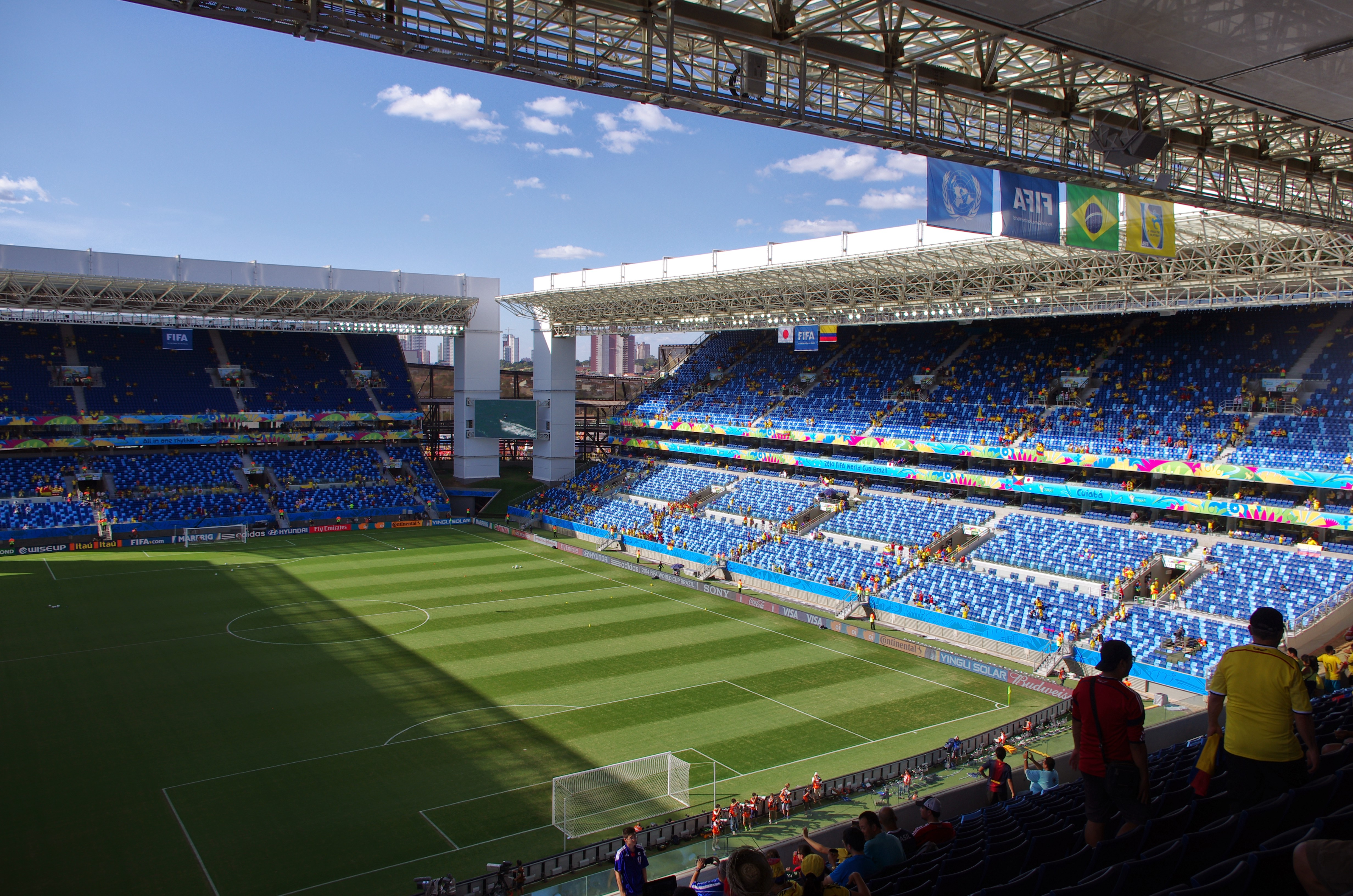 Cidade Alta, Cuiabá - MT, Brazil